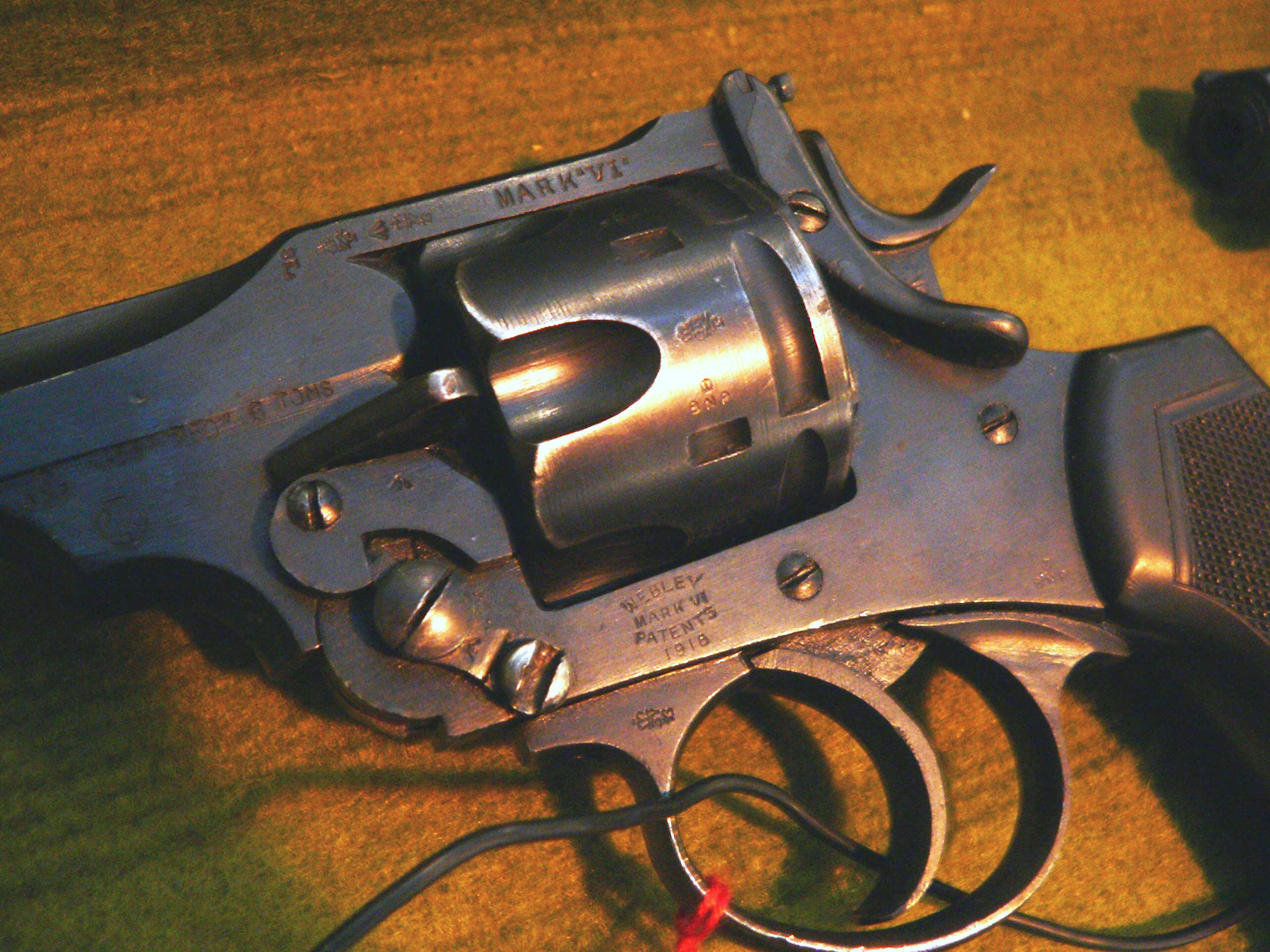 Revolver Webley Mk VI Webley & Scott Mk VI. Caliber .455